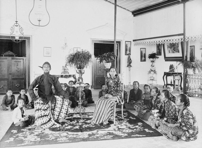 Foto. Geheel links op de foto zit Siti Soendaroenijah, de eerste dochter van Prins Poerbojo en zijn echtgenote Poedjaningdjah. (dit is niet de vrouw naast hem op de foto). Later kreeg deze dochter de naam Goesti Kandjeng Ratoe Pembajoen.. Prins Poeroebojo, majoor van de generale staf en broer van de kroonprins van Yogyakarta, met zijn echtgenote en bedienden. Zijn hoge status is af te lezen aan het reusachtige parang rusak motief op zijn kain panjang. Java